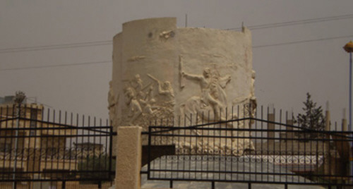 لؤي الزعبي المسؤول بلبالبالبا بلالبالبا